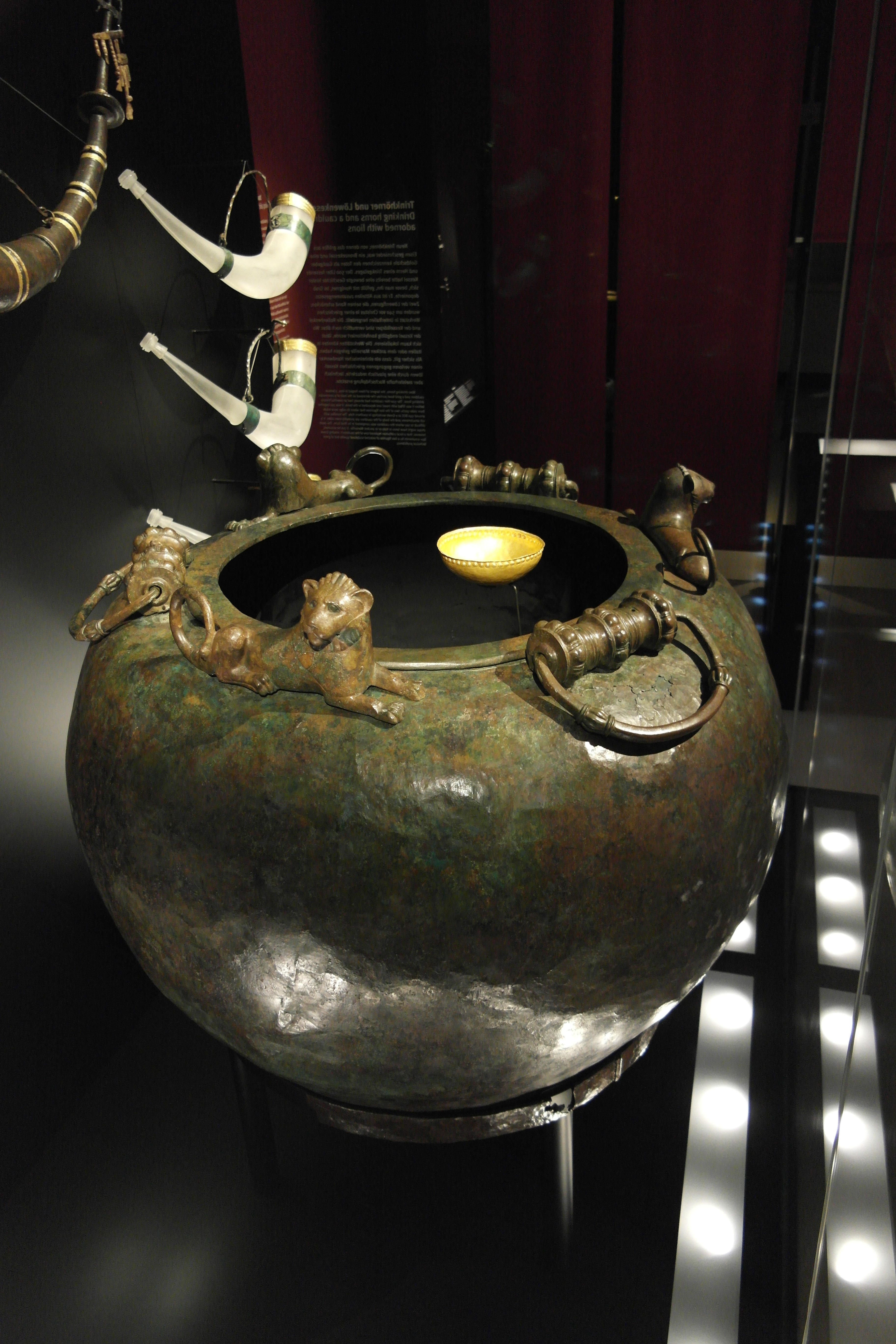 Kelten: Löwenkessel aus Bronze, Detail.